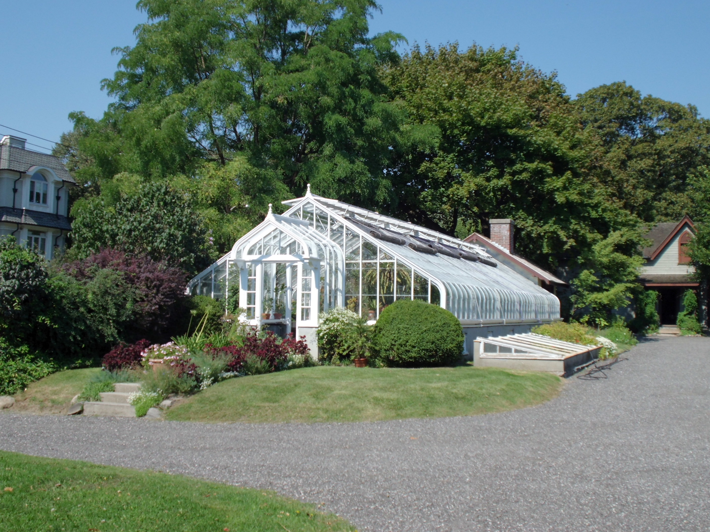 Spadina House greenhouse